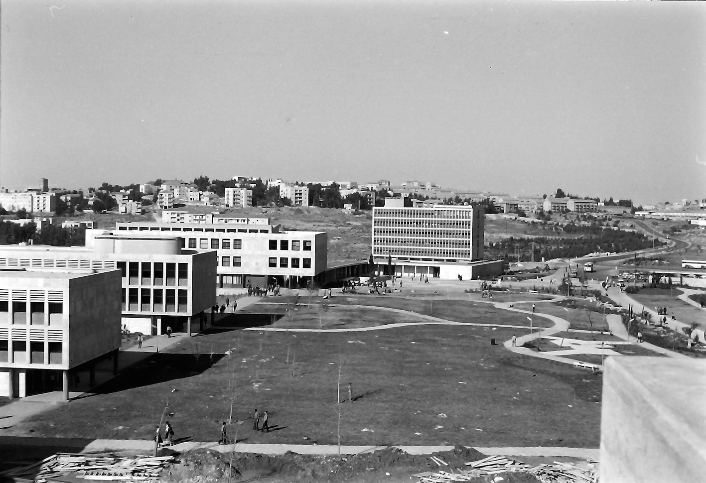 Älteste Gebäude auf dem Edmond-Safra-Campus, angelegt nach Plänen Richard Kauffmanns, Ossip Klarweins und Heinz Raus auf der Givʿath Ram (ein judäischer Hügel), Jerusalem, v.r.n.l. Sherman-Verwaltungsbau (von Dov Carmi, Zvi Melzer und Ram Carmi), Feldman-Bau, Sprinzak-Bau und Berman-Bau, 1954-1958 erbaut